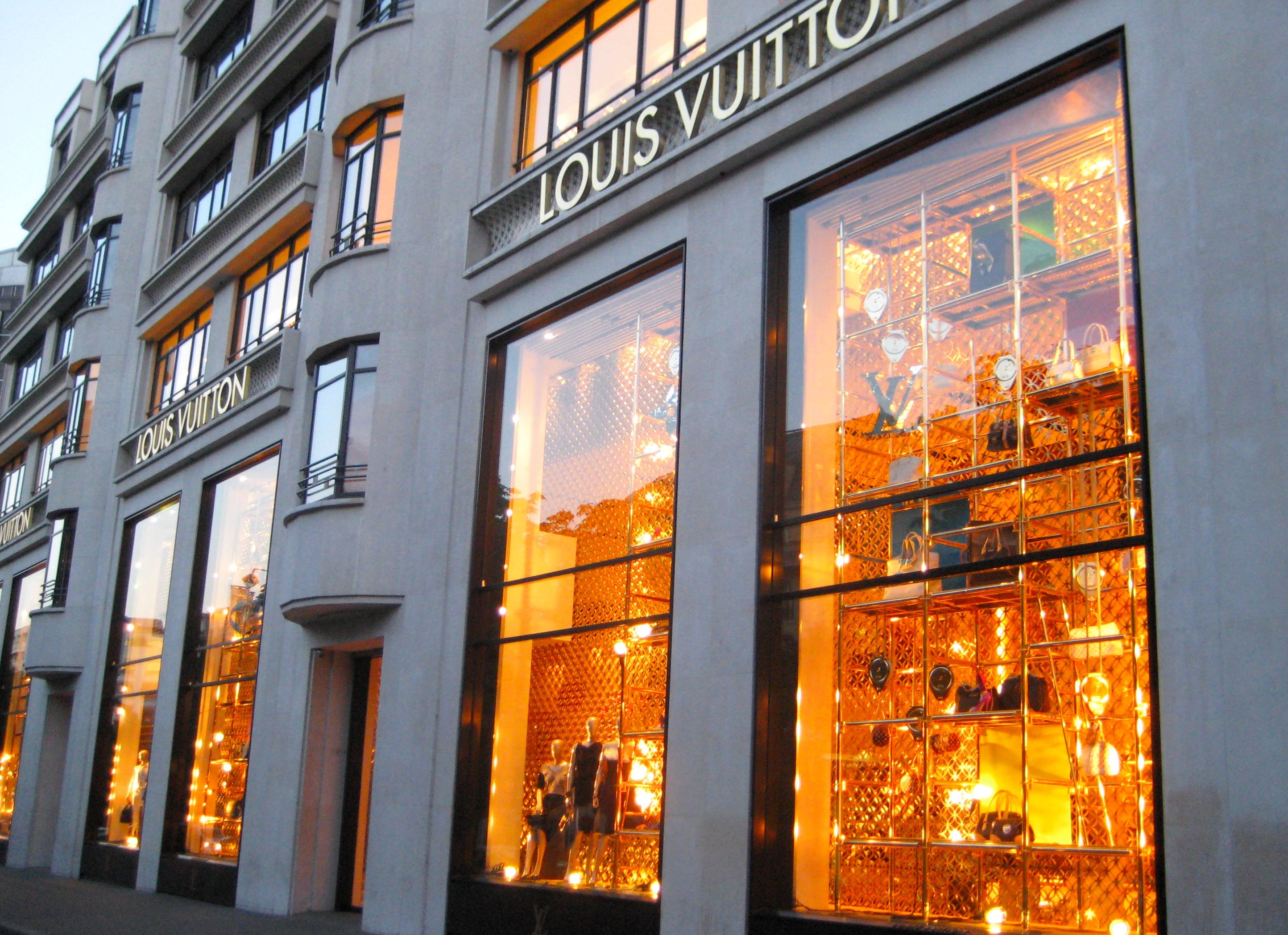 Louis Vuitton, Champs-Elysées Paris